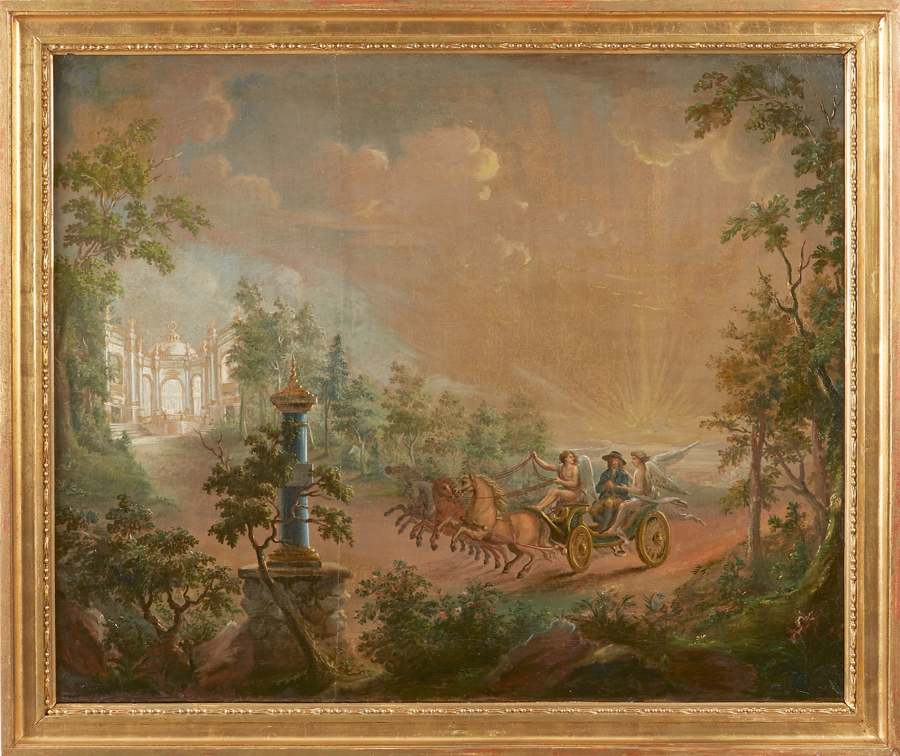 Anders Hultgren, "Änglar i fyrspann på väg mot pärleporten", olja på duk, 84 x 104,5 cm, samtida förgylld ram.